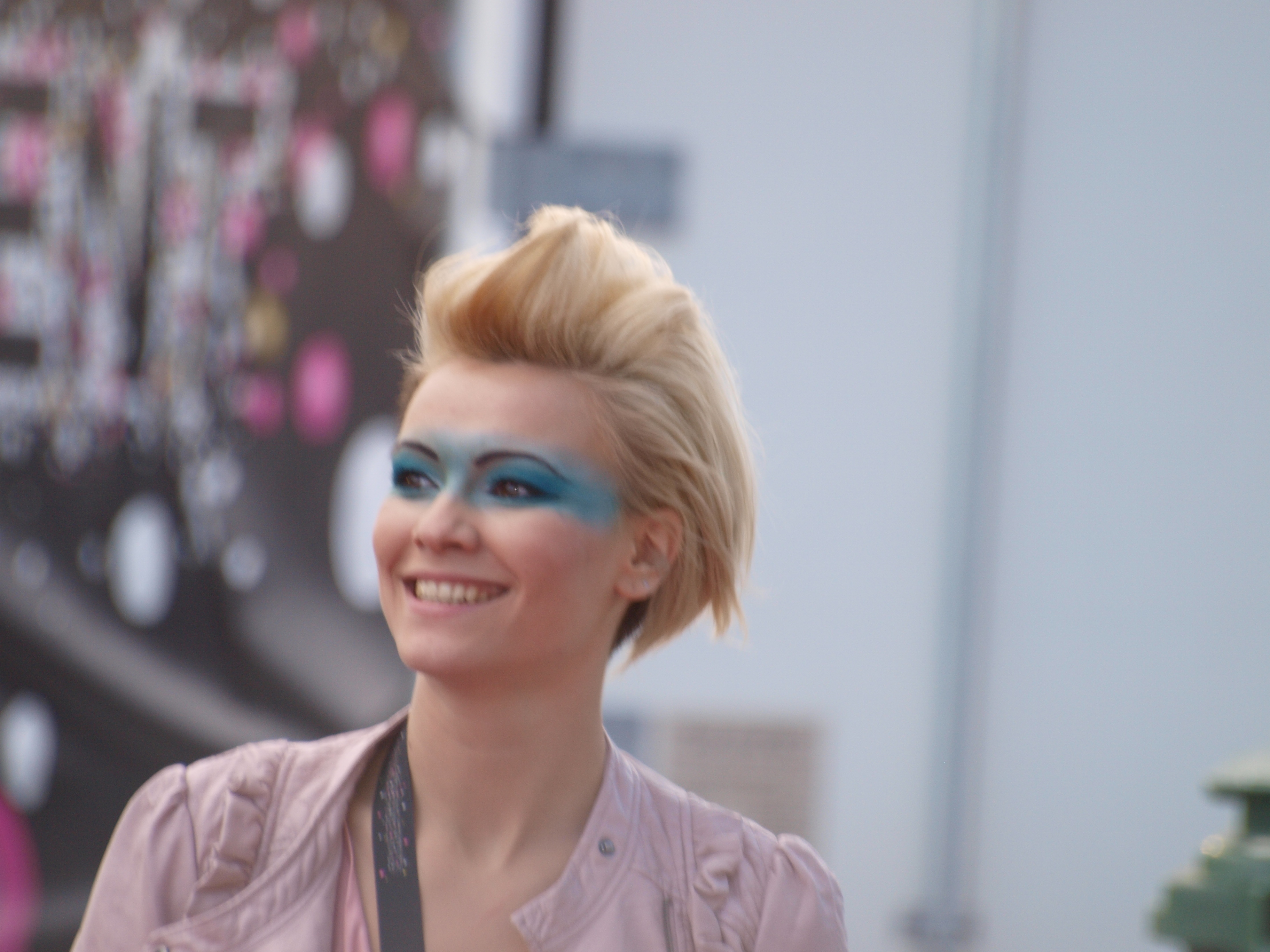 Olia Tira at ESC 2010